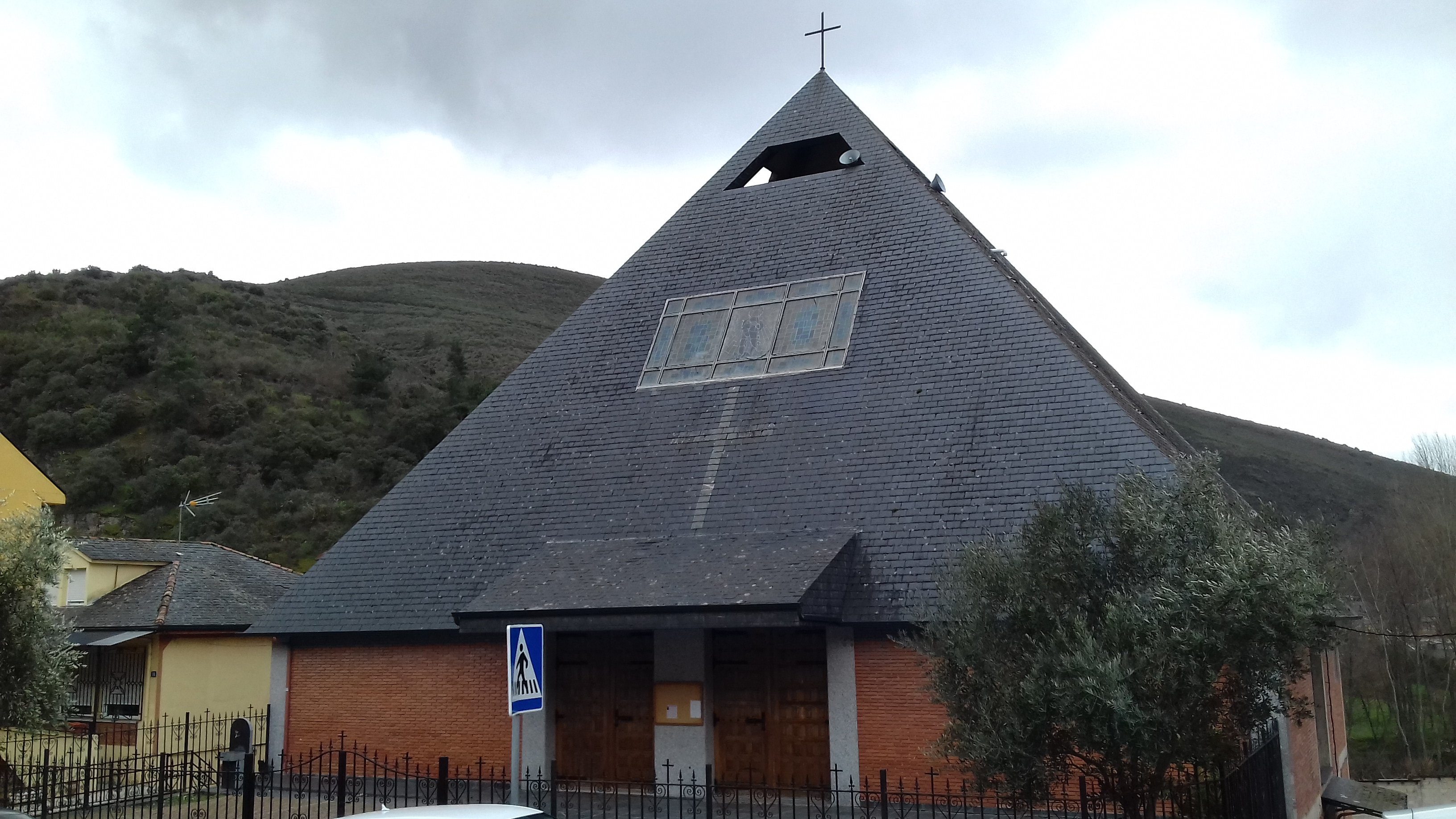 Igrexa da Ponte de Domingos Flórez